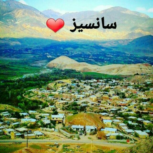 مکان روستا استان زنجان:شهرستان طارم:روستای سانسیز